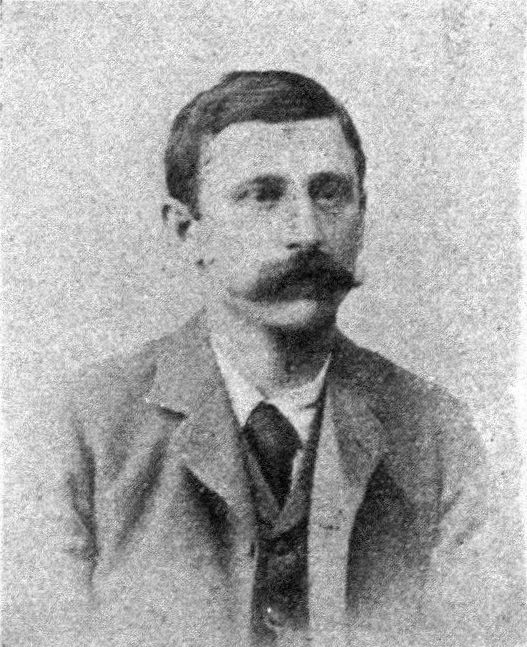 Österreichischer Politiker, Reichsratswahl 1907, Name siehe Dateiname